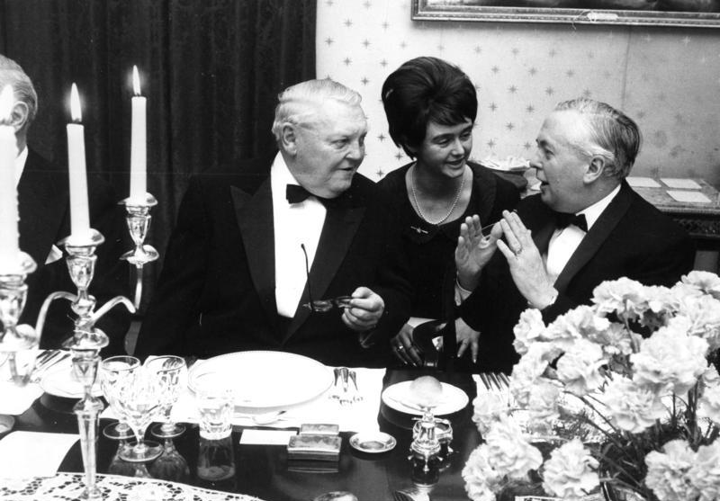 März 1965 Besuch des britischen Premierministers [Harold] Wilson Abendessen in der britischen Residenz